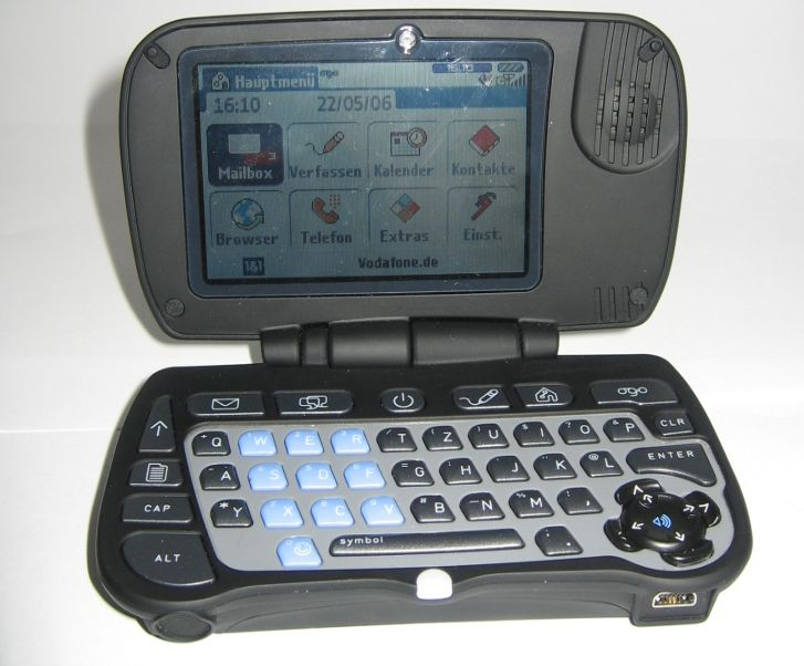 Ogo im aufgeklappten Zustand